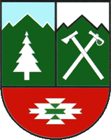 Герб Косівського району